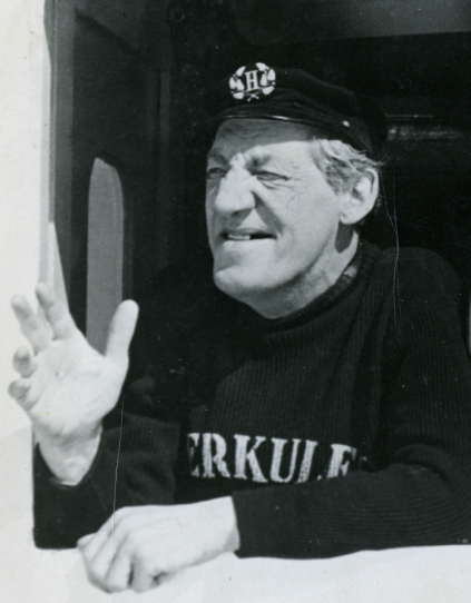 Emil Fjellström ur filmen Sjöcharmörer 1939